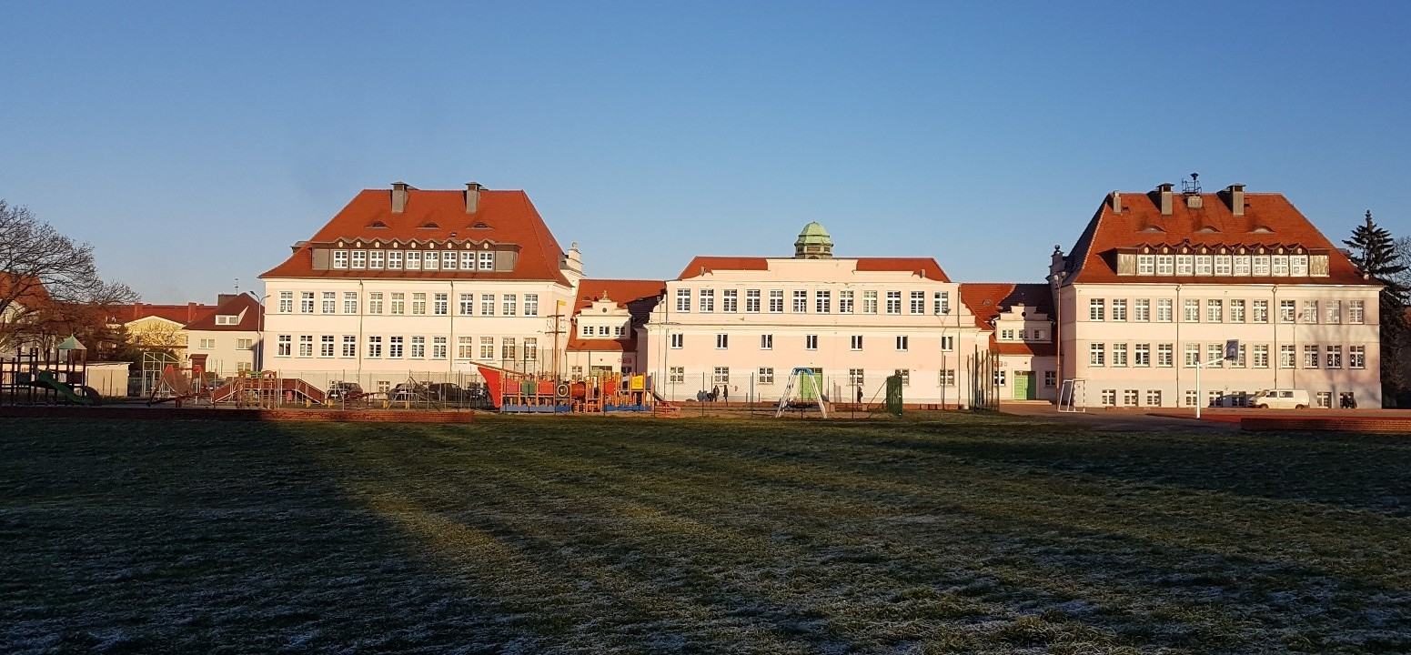 Budynek byłego Liceum Pedagogicznego